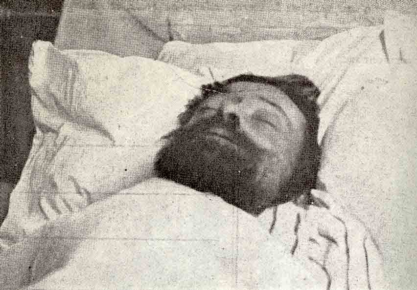 Pierre Martin dit Le Bossu, né le 16 août 1856 à Vienne (Isère) et mort à Paris le 6 août 1916, est canut (ouvrier tisseur), photographe ambulant et militant anarchiste.